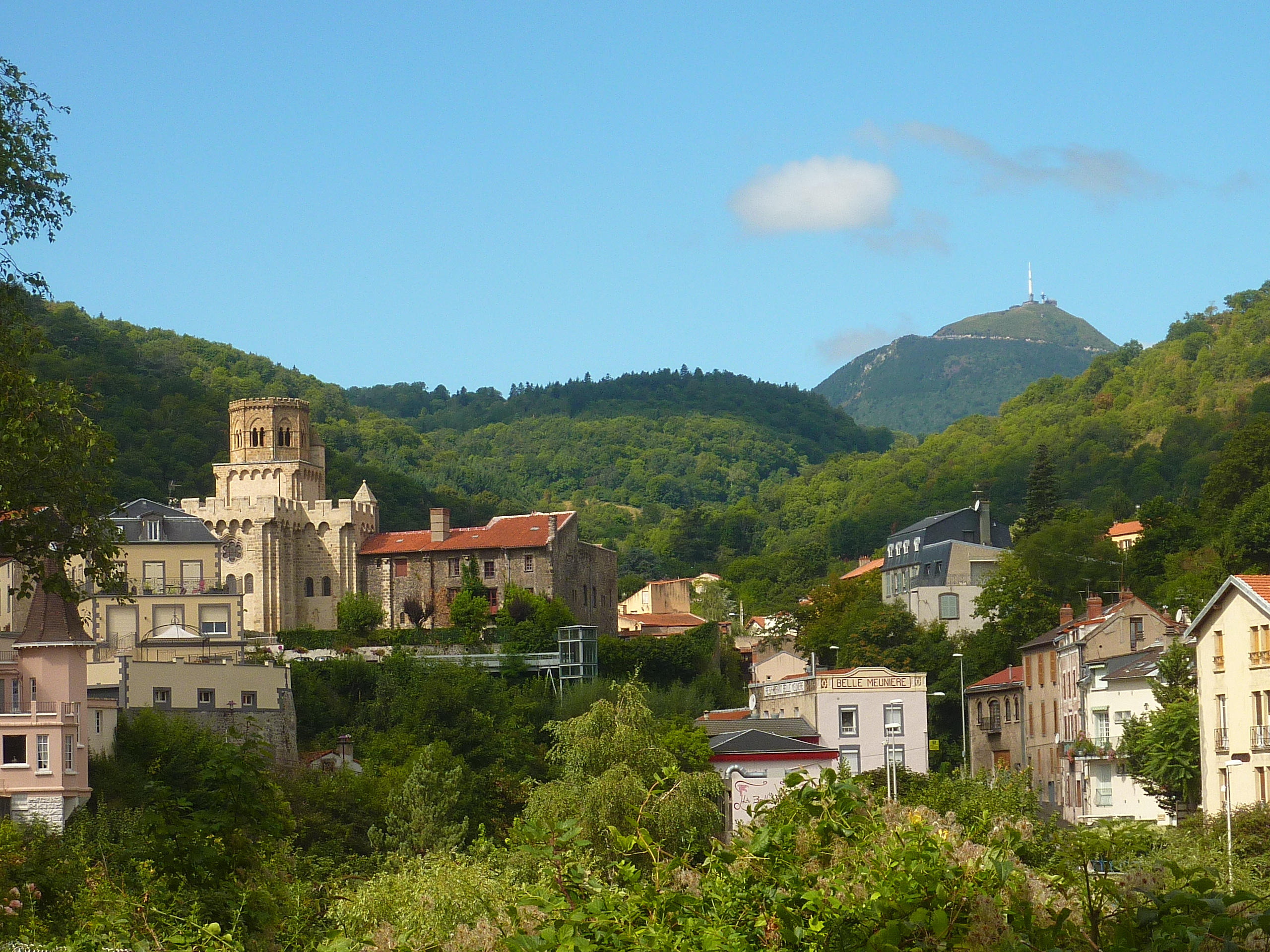 Ville de Royat avec son église fortifiée et Puy-de-Dôme